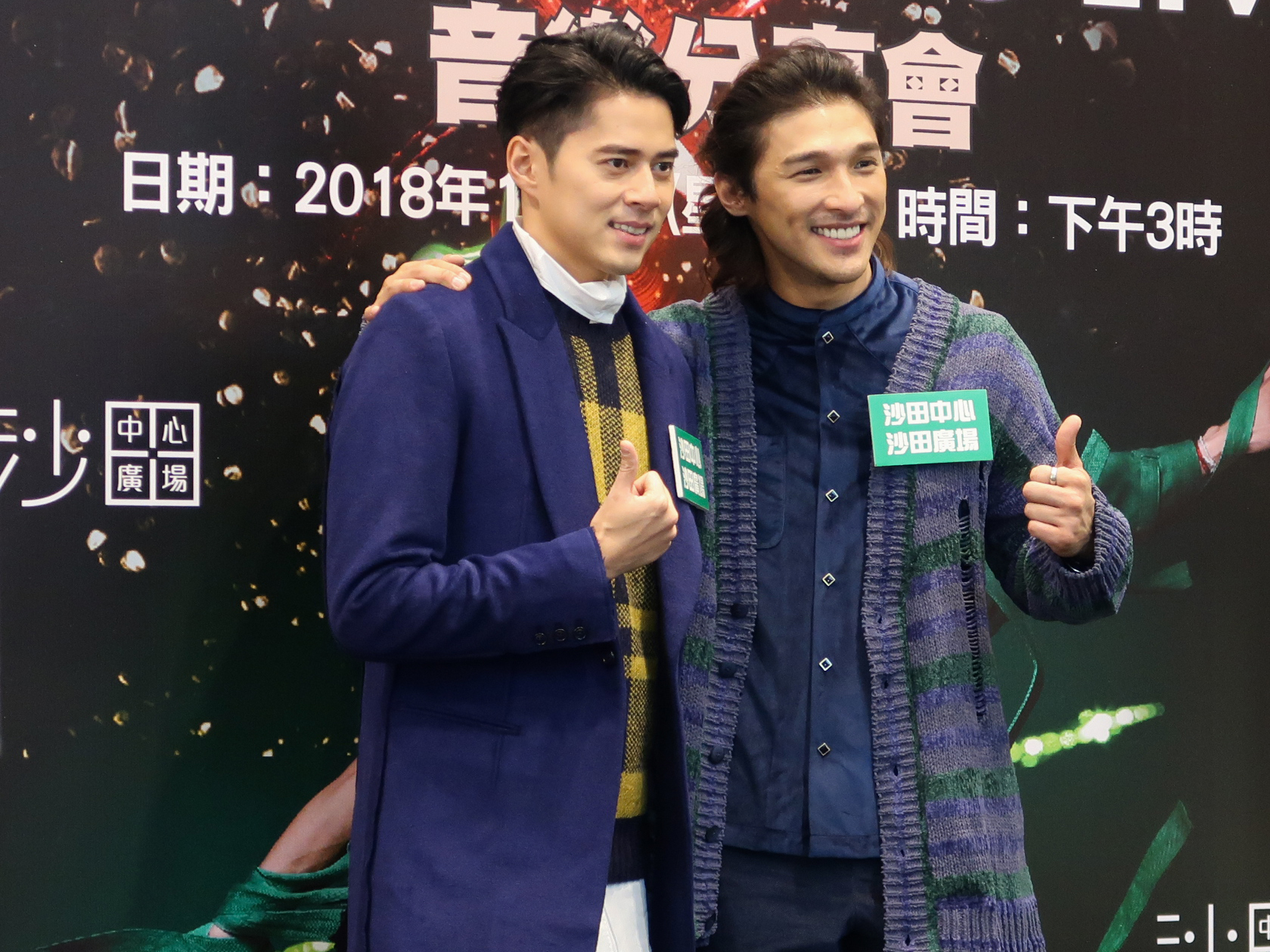 SHINE